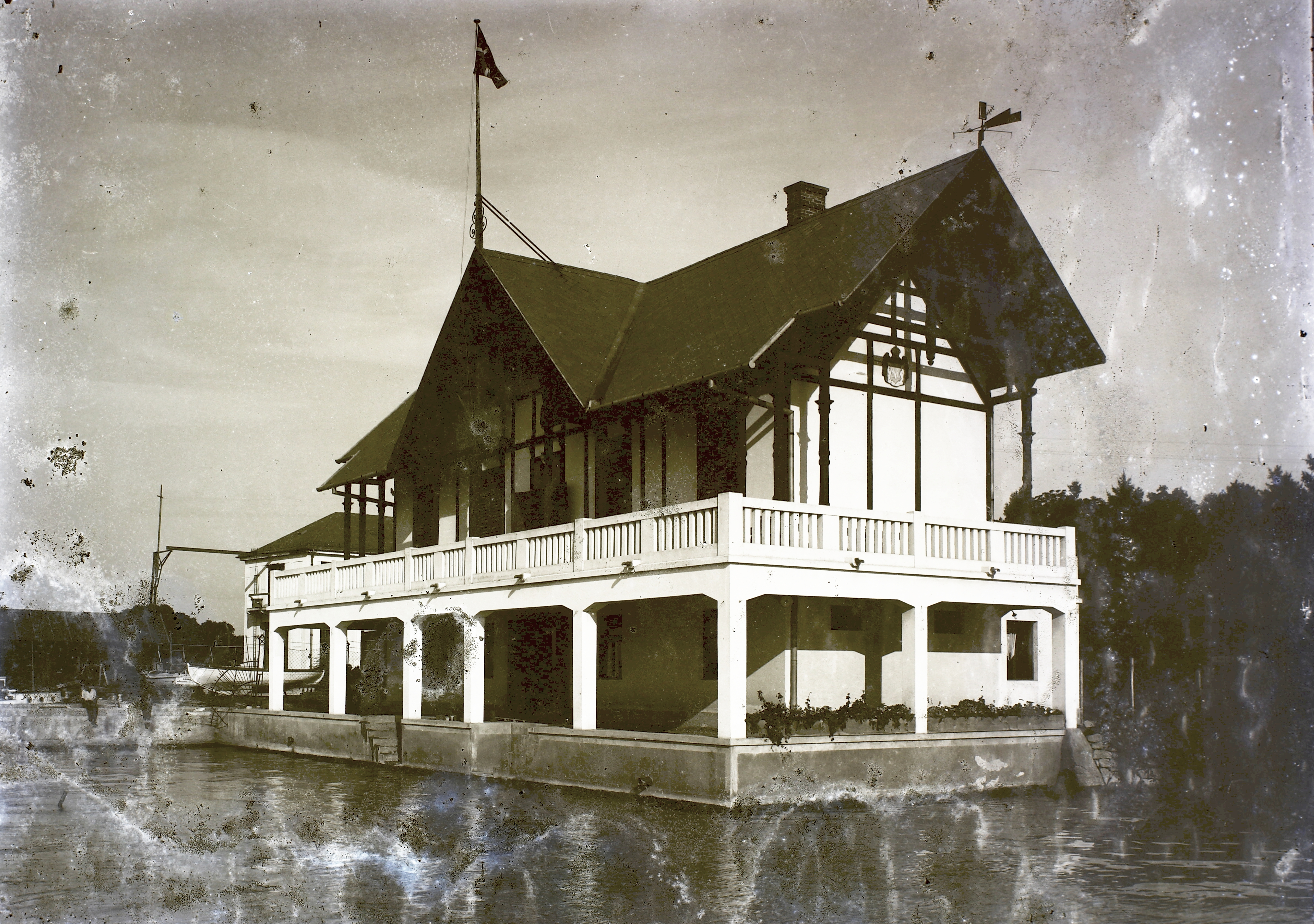 Királyi Magyar Yacht Club. Location: Hungary, Balatonfüred Title: Királyi Magyar Yacht Club.